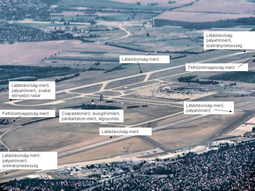 A Ferihegyi repülőtér meteorológiai képe